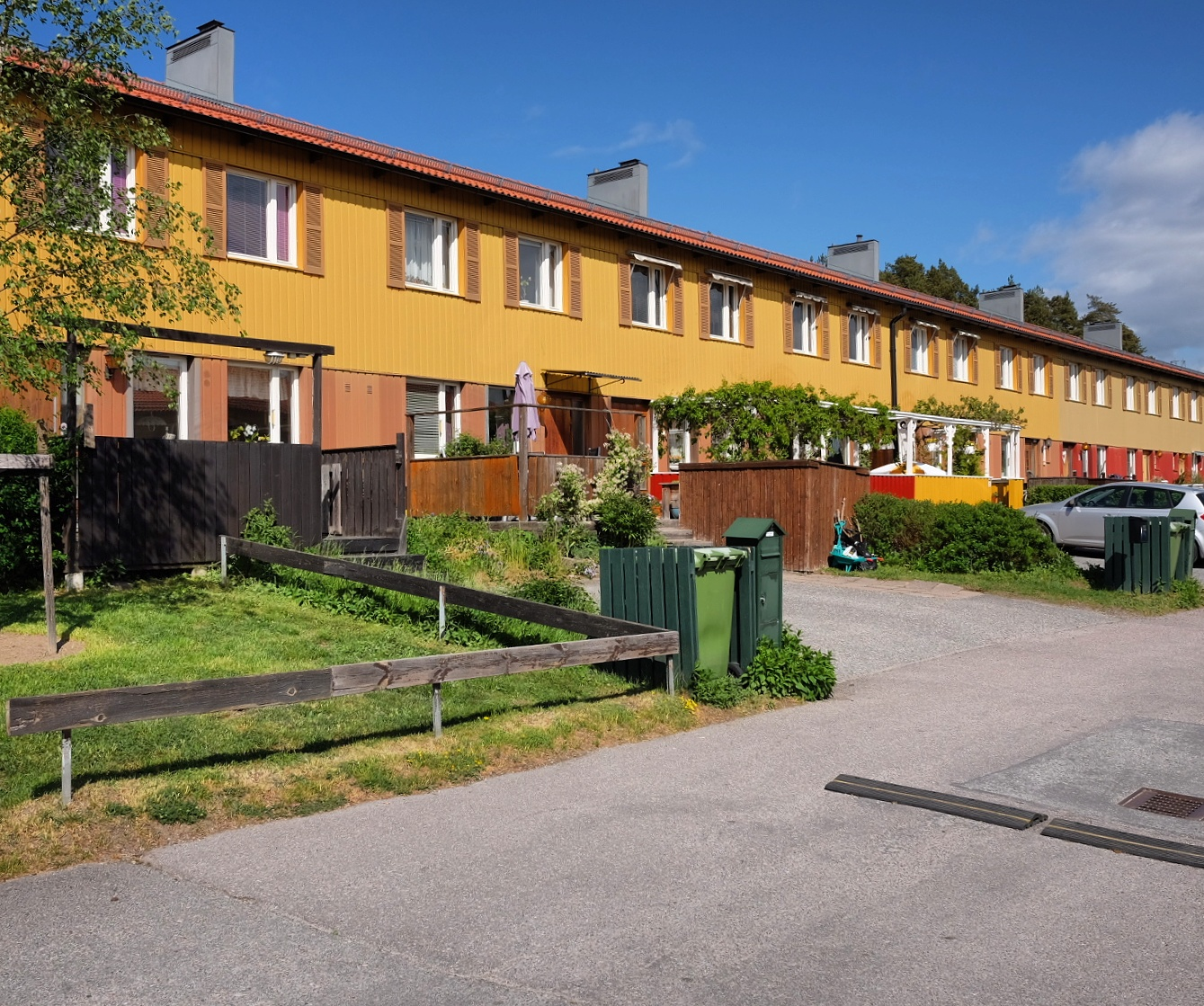 Radhusområde vid Flygarvägen och Vålbergavägen i Barkarby, Stockholm.